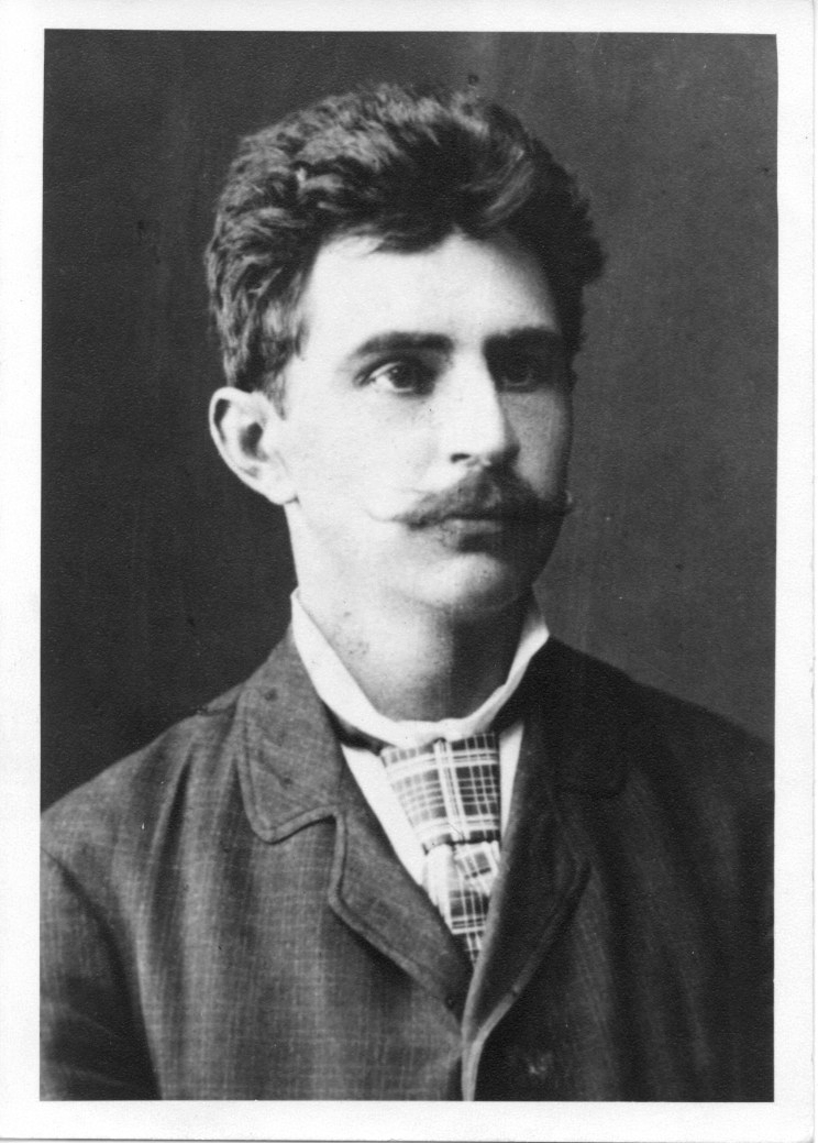 Csonka János (Szeged, 1852. január 22. – Budapest, 1939. október 27.) magyar feltaláló, tiszteletbeli gépészmérnök. A Bánki-Csonka-féle karburátor és a vegyesüzemű Csonka-motor feltalálója.